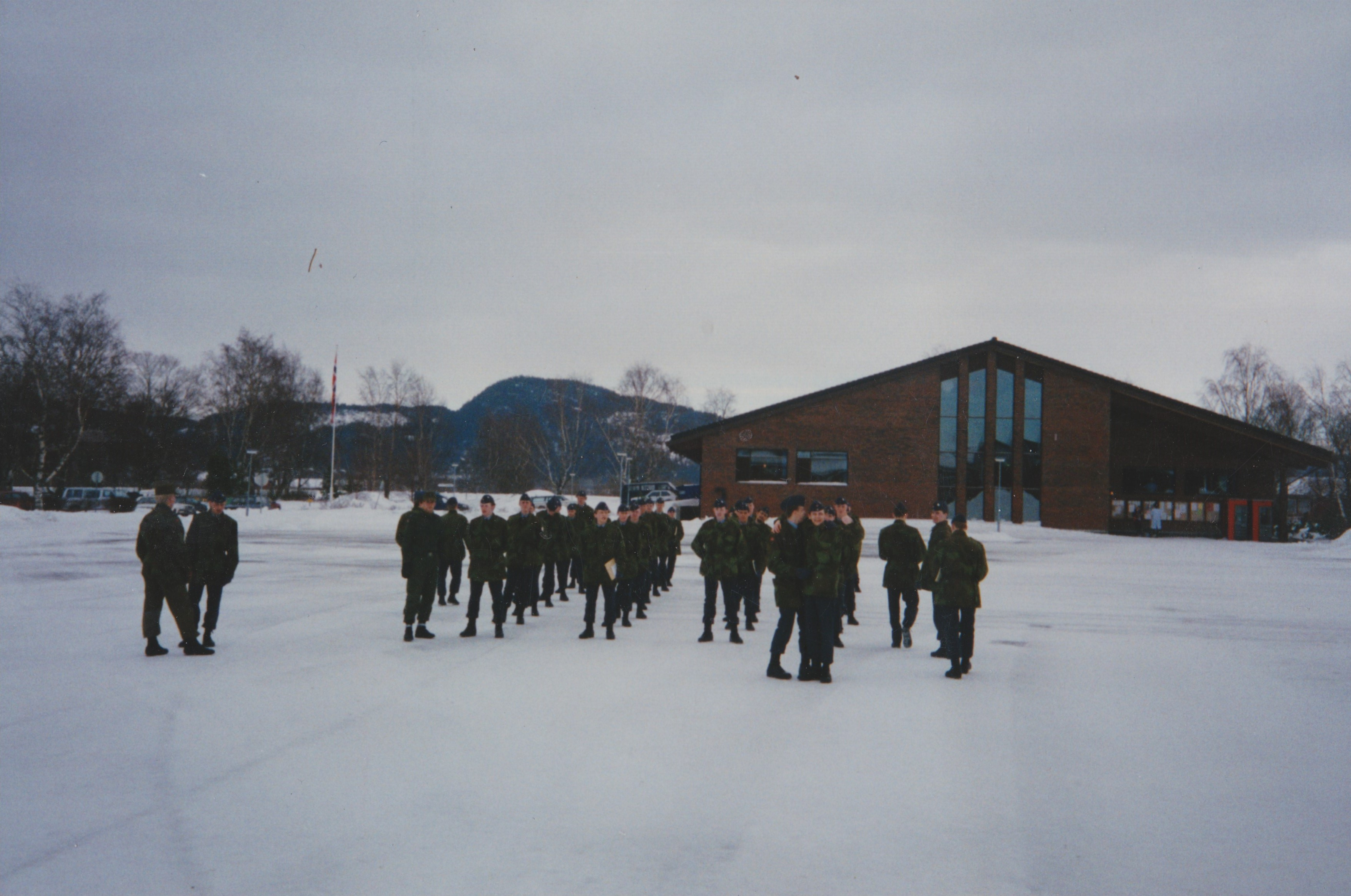 Luftforsvarets rekruttskole, Værnes flystasjon, januar, 1994.